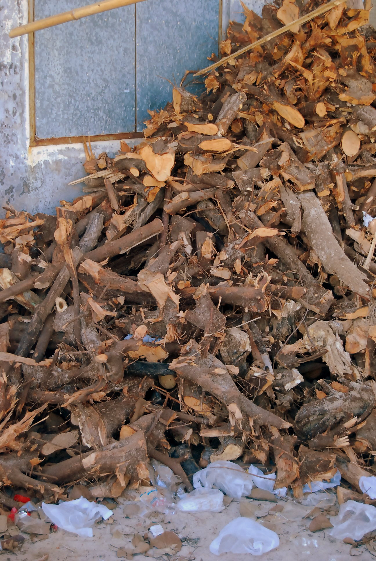 柴火，摄于文昌